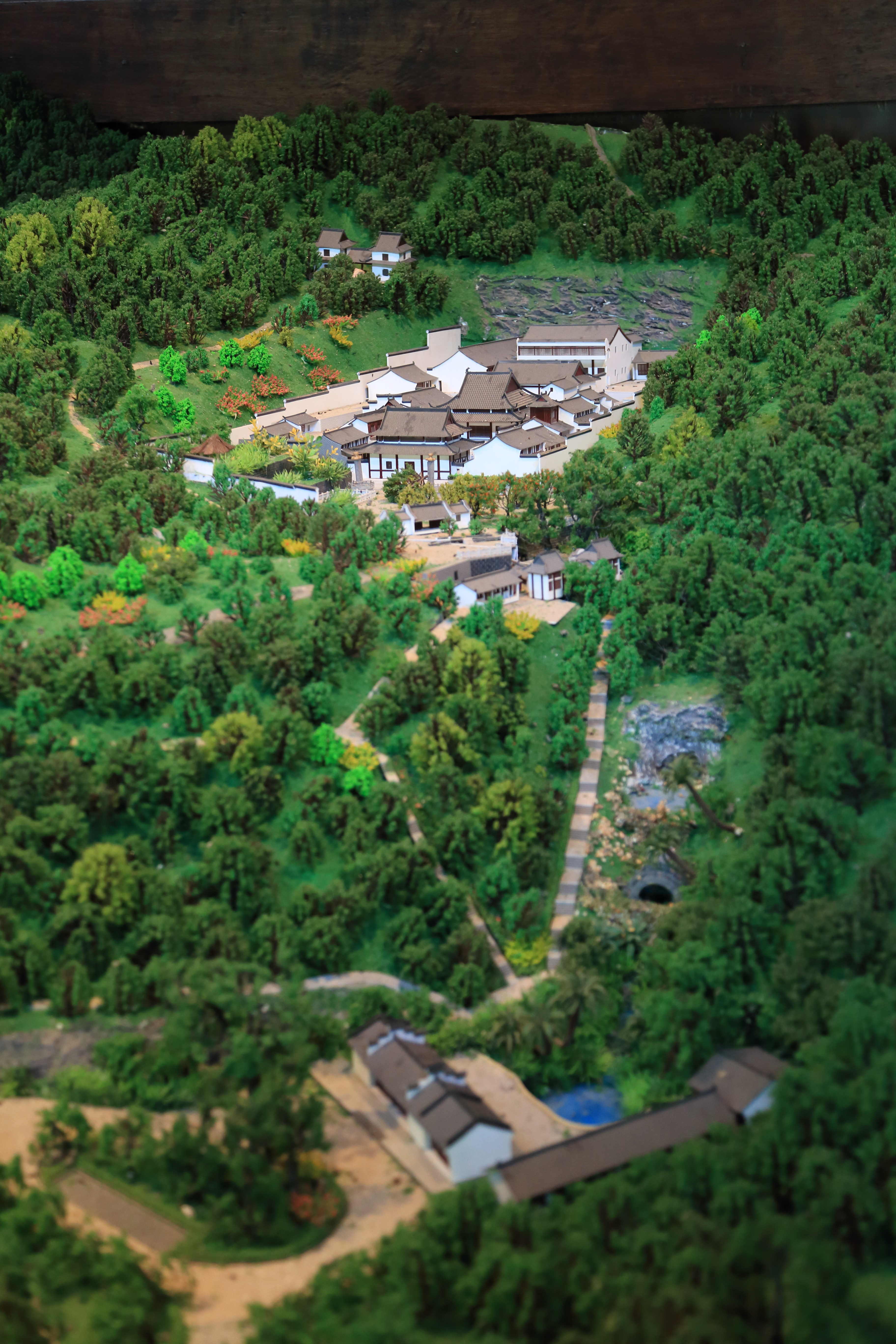 宁波市保国寺 —— 天王殿内部的保国寺模型